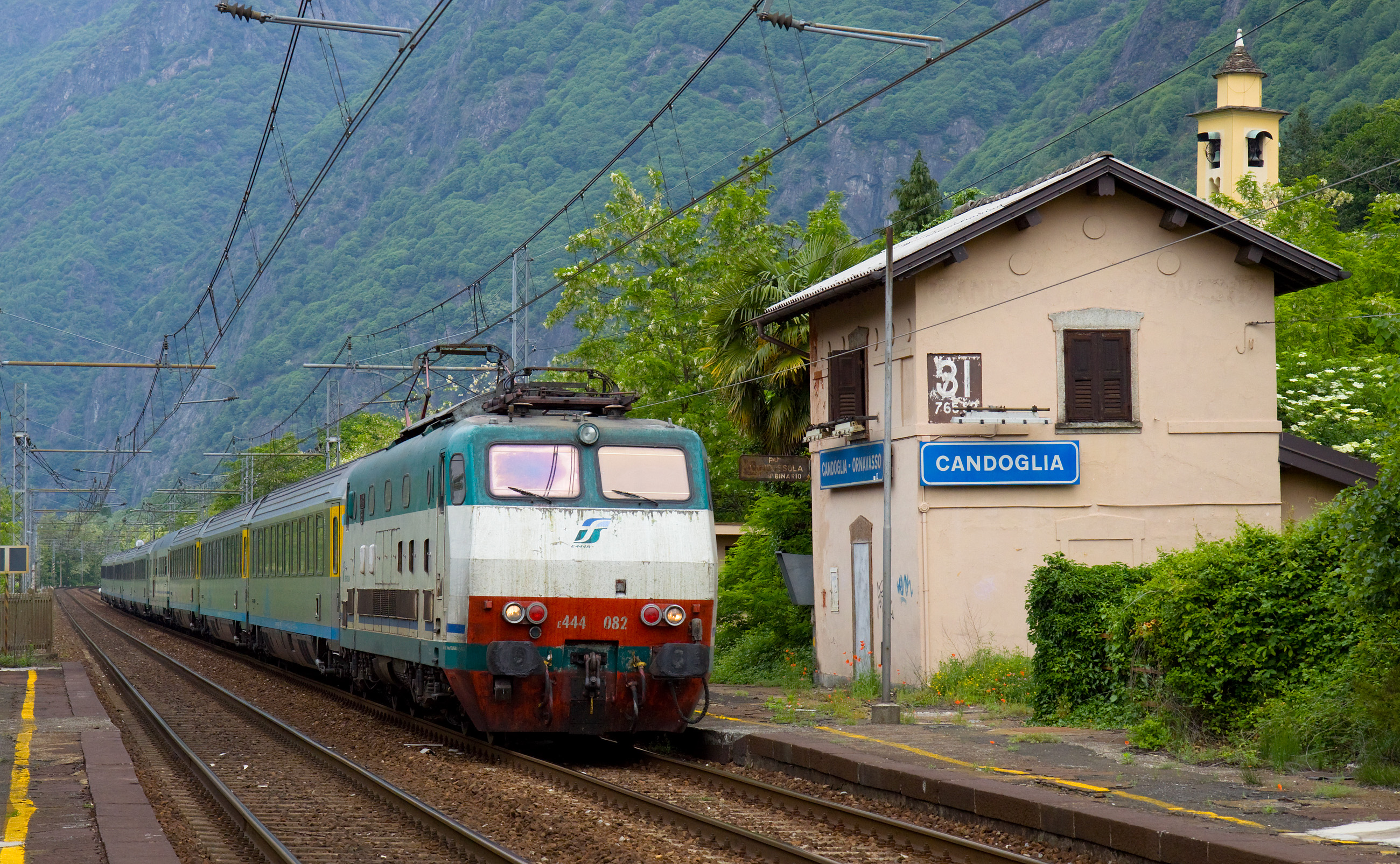 Treno EuroCity in transito nella stazione di Candoglia-Ornavasso